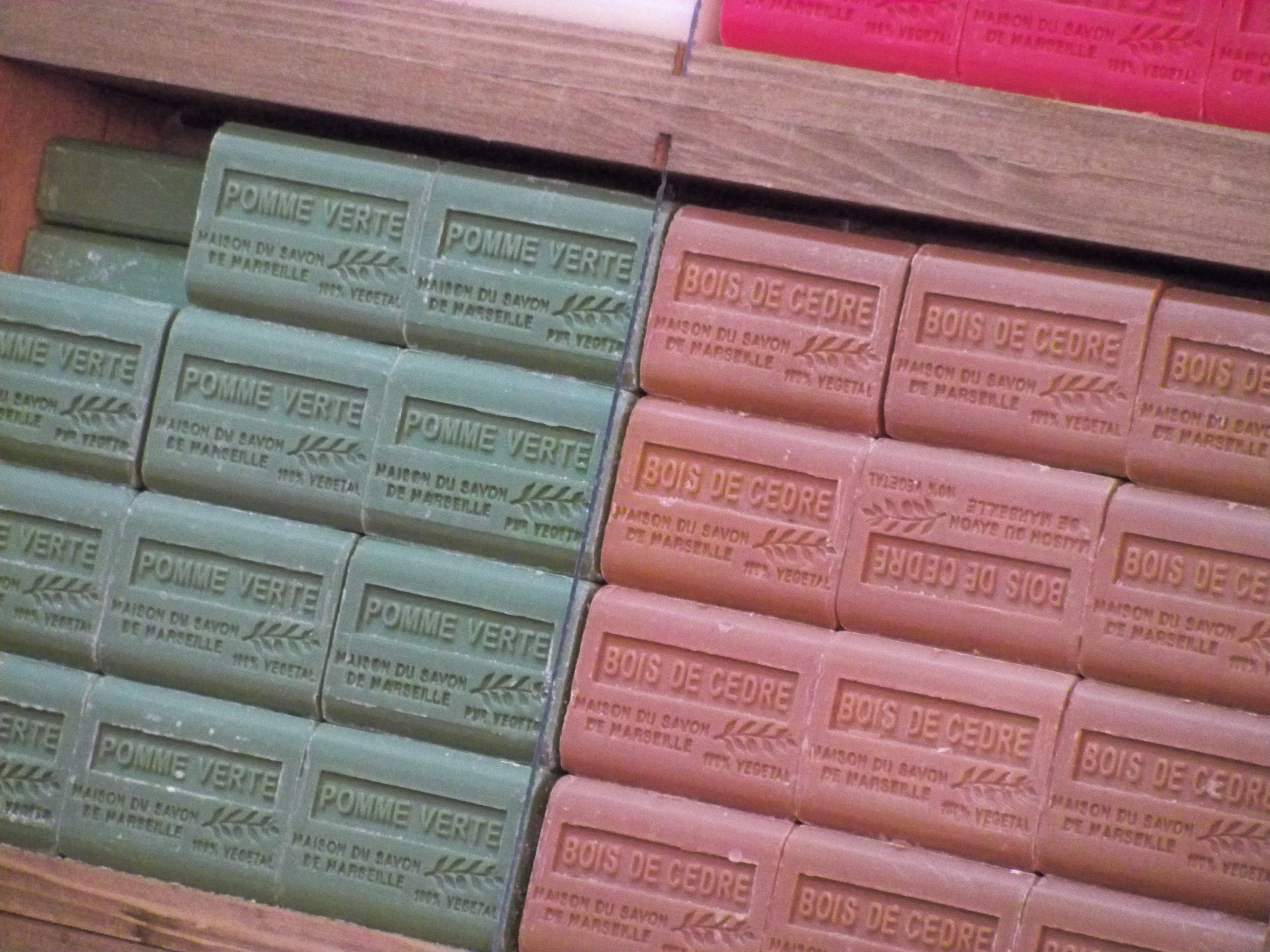 Ventes de Savon de Marseille